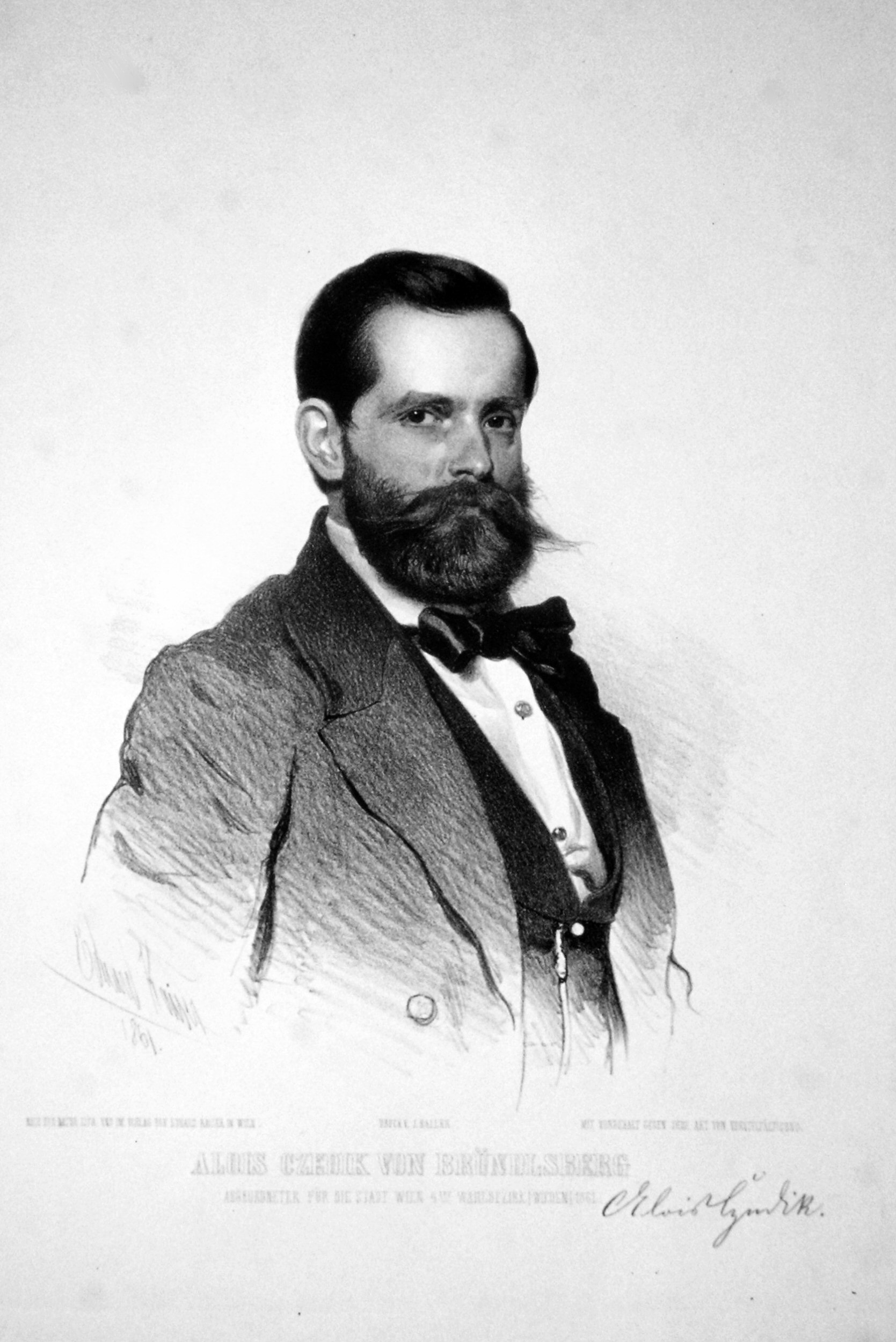 Alois Czedik Freiherr von Bründlberg und Eysenberg (1830-1924). Generaldirektor der k. k. Kaiserin Elisabeth Bahn, Lehrer Offizier und Beamter Lithographie von Eduard Kaiser, 1861